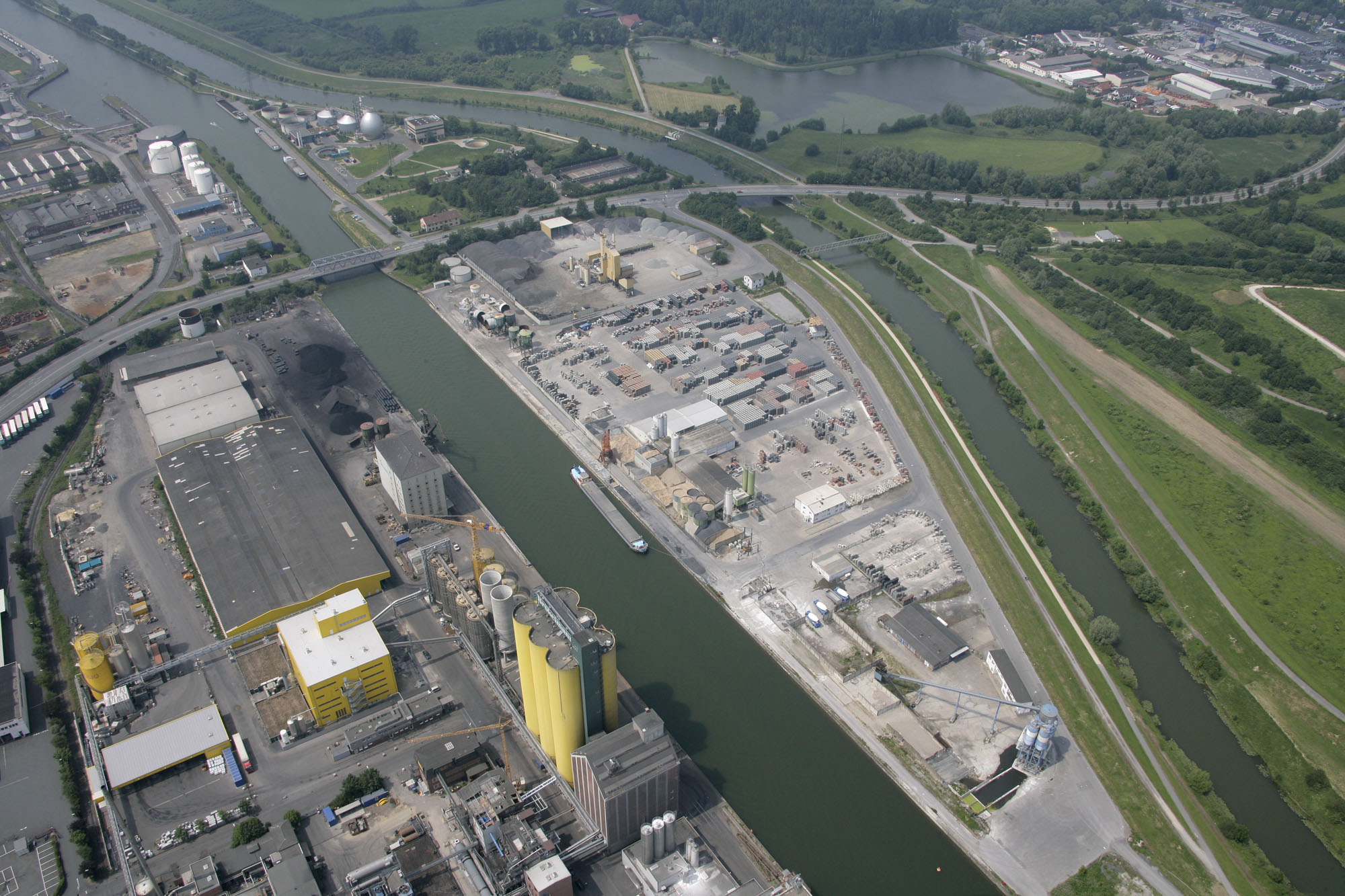 Luftbildaufnahme Hamm